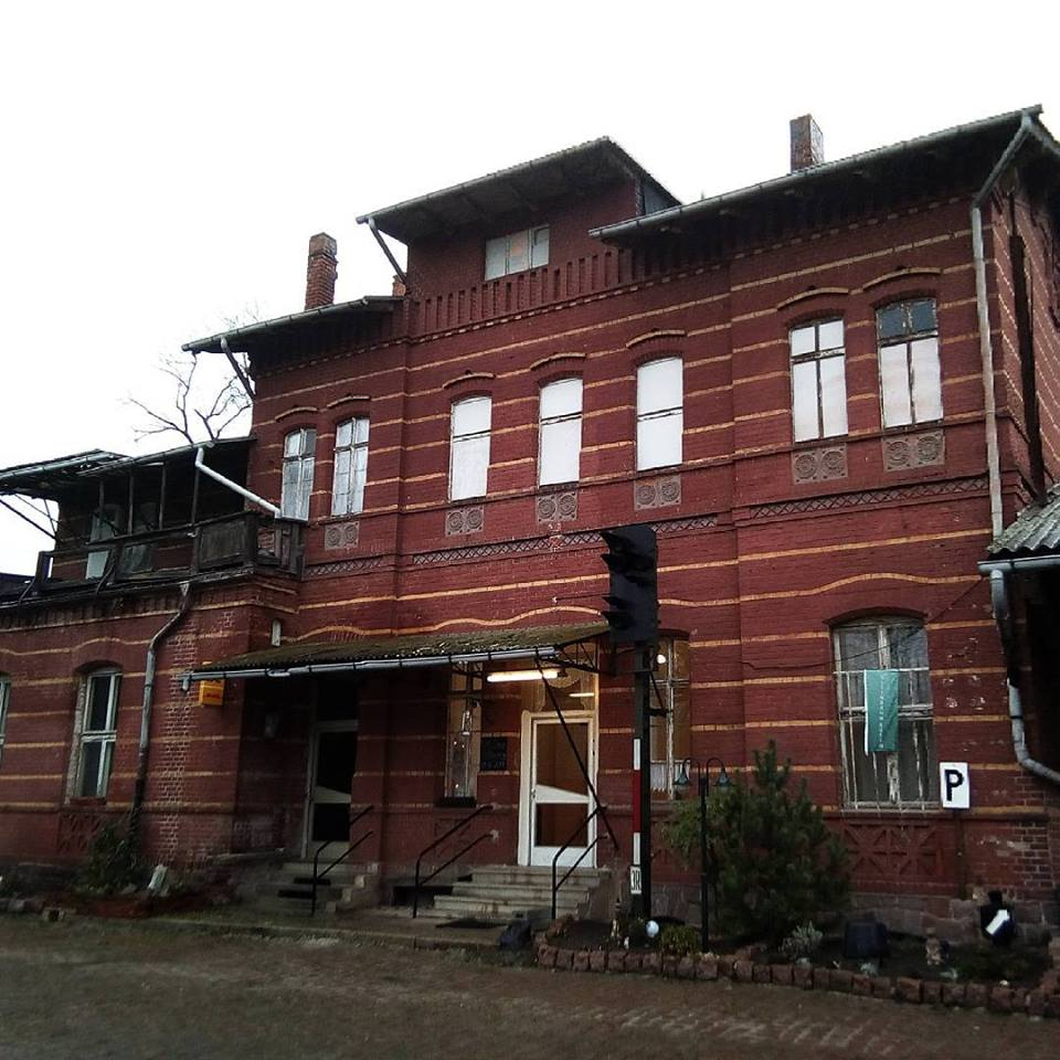 Deitsch: ehm. Staatsbahnhof Güsen Baujahr: 1846